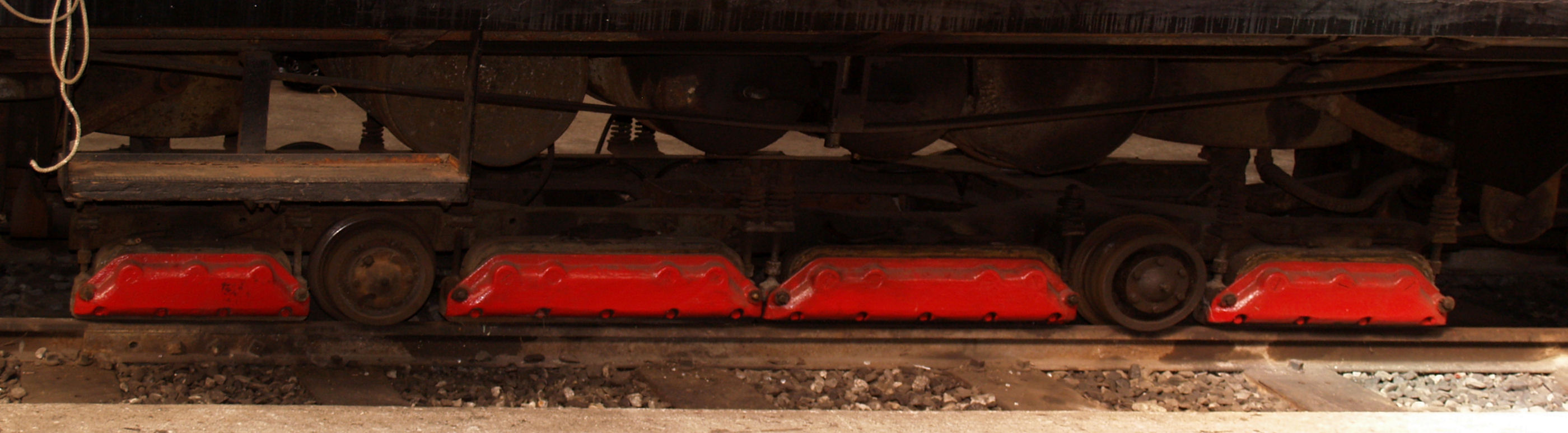 Der Magnetschienenbremsen-Wagen der RhB Ge 4/4 181